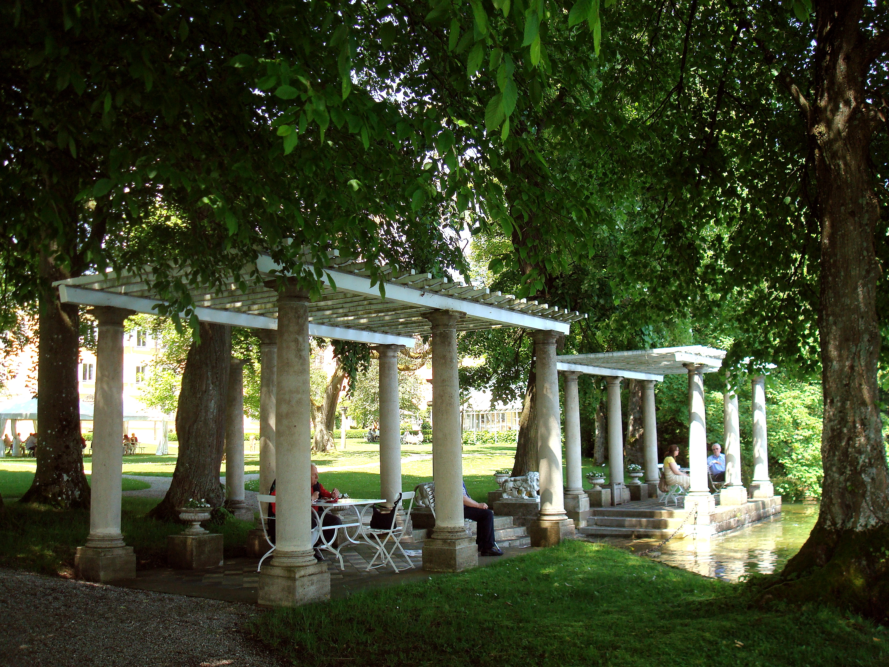 Tutzing, Schloss Tutzing, Schlosspark. Säulenpergola aus der Zeit um 1870.